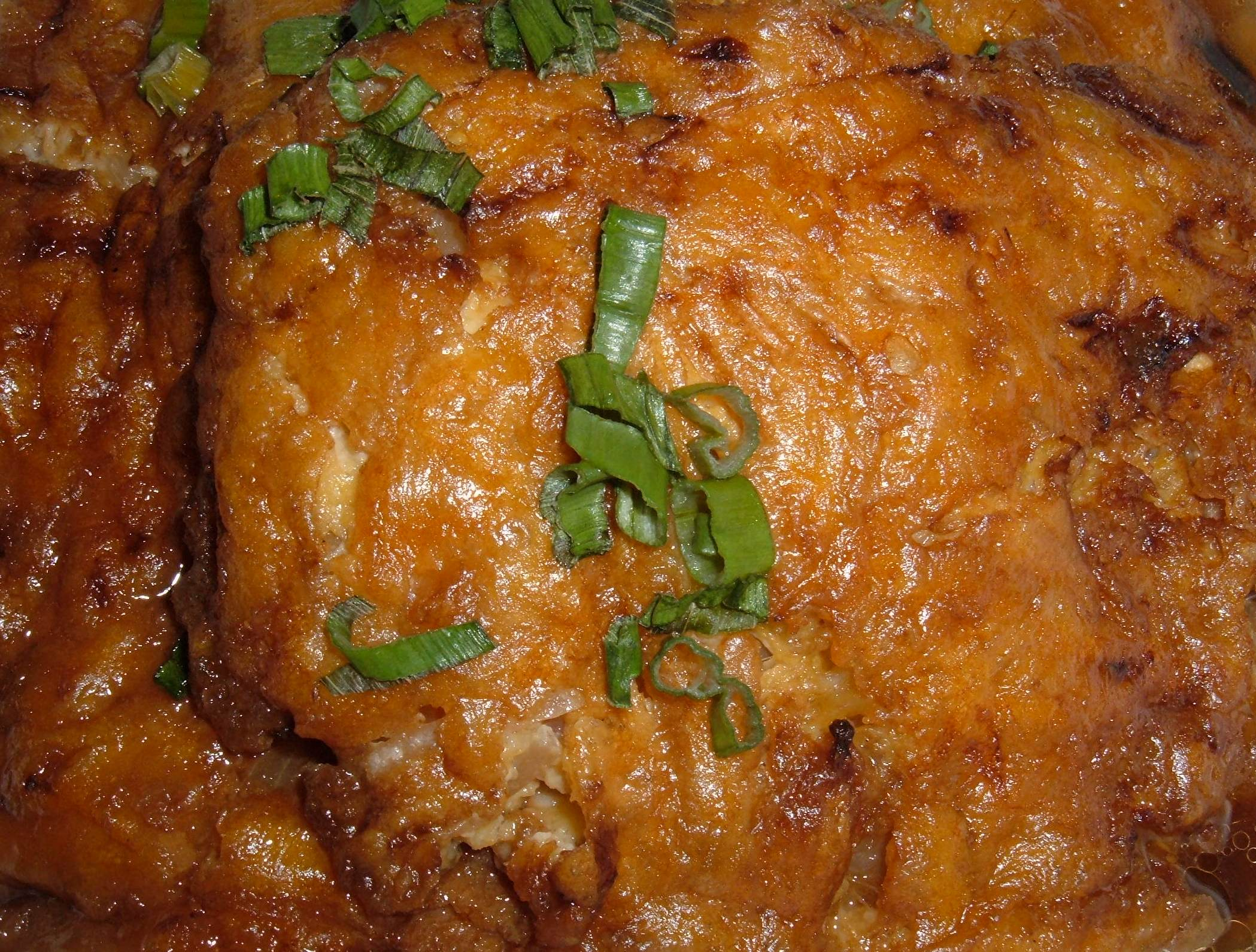 Egg foo young